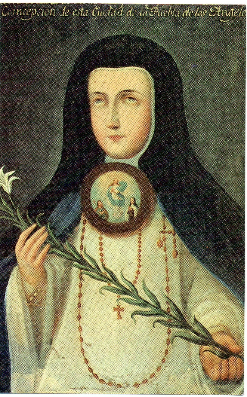 Lirio De Puebla, OIC - Federación Santa Mª de Gpe - Monasterio de la Inmaculada Concepción de la Puebla de los Ángeles